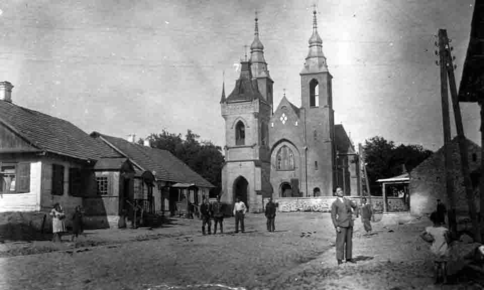 Беларуская (тарашкевіца): Мсьцібаў (Mścibaŭ), пляц Рынак (plac Rynak). Новы касьцёл